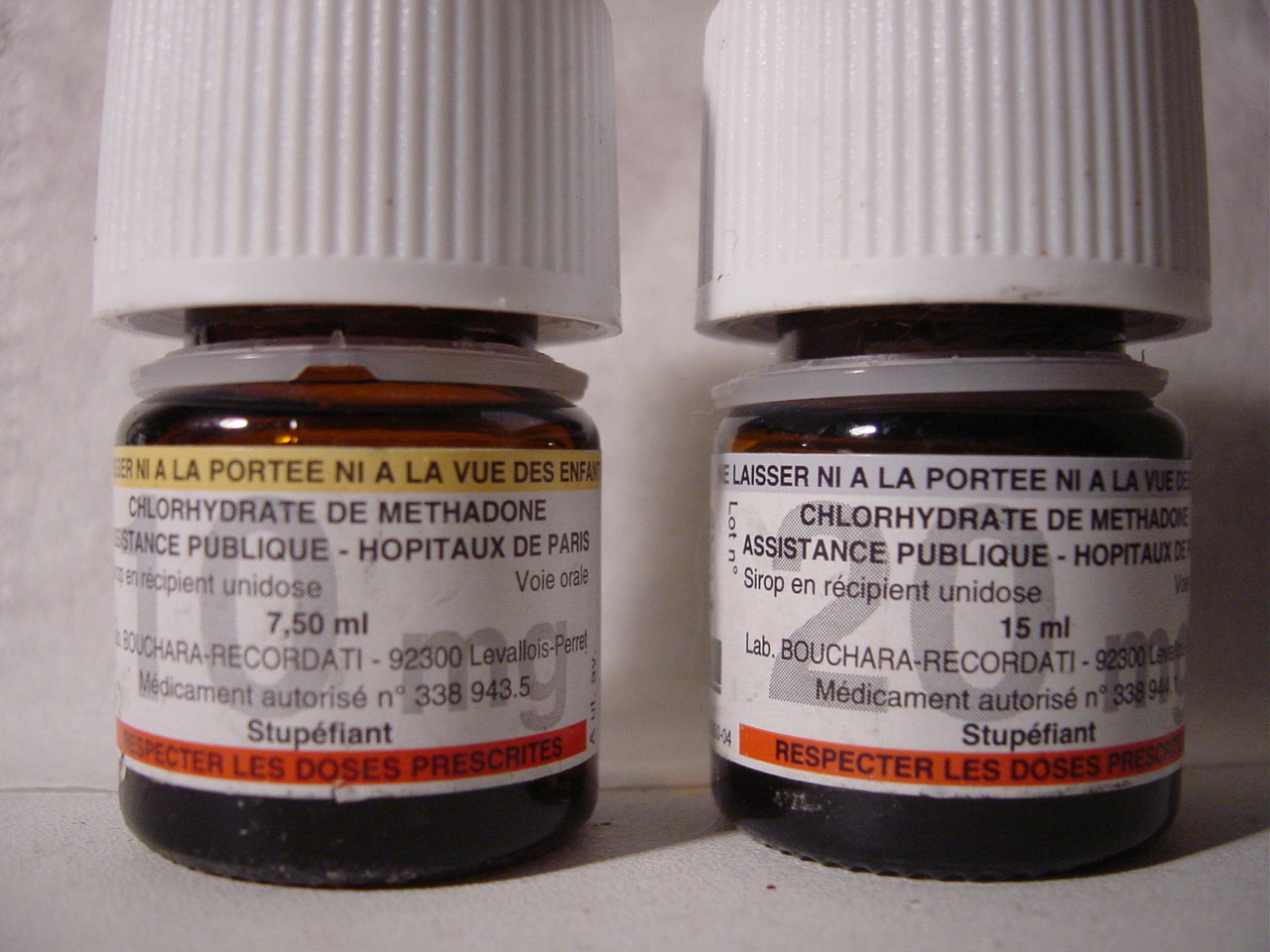 Deux Flacons unidoses de Chlorhydrate de méthadone en sirop administration per os (deux dosage différents : 10mg et 20mg) . Auteur et date : Raziel {boudoir} 26 octobre 2006 à 21:48 (CEST)